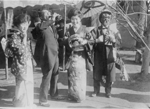 ja:、正邦宏ほか、1920年代